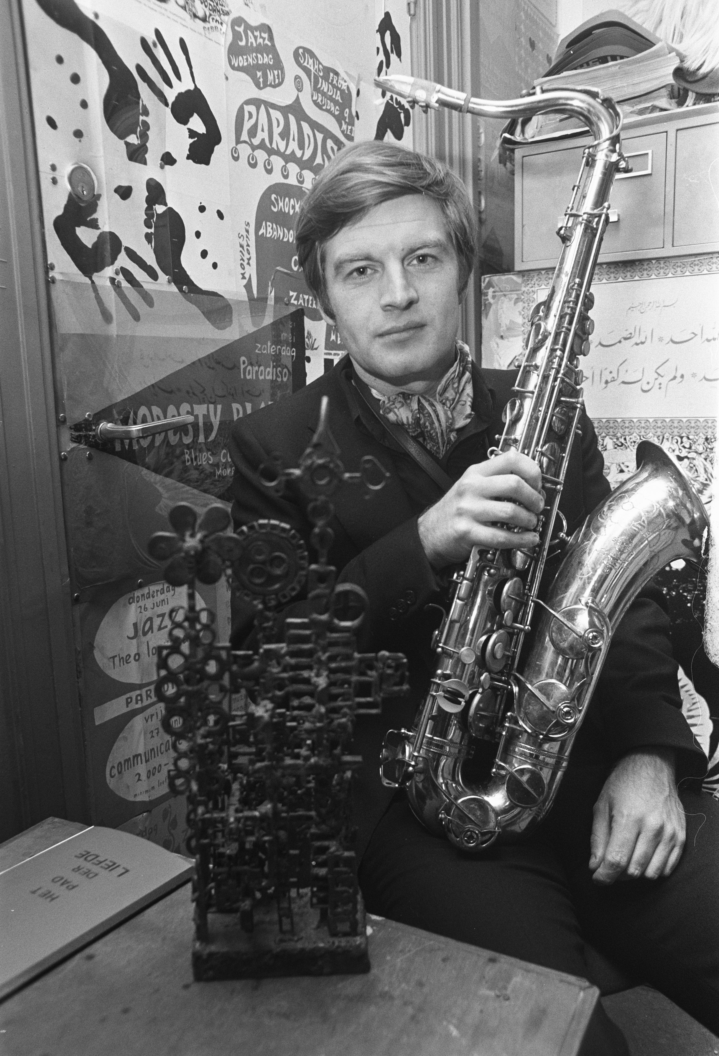 Collectie / Archief : Fotocollectie Anefo Reportage / Serie : [ onbekend ] Beschrijving : Saxofonist Hans Dulfer kreeg Wessel Ilckenprijs voor prestaties in de jazz in Paradiso Amsterdam. Hans Dulfer met sax en plastiek Datum : 10 december 1969 Locatie : Amsterdam, Noord-Holland Trefwoorden : Saxofonisten Persoonsnaam : Hans Dulfer Instellingsnaam : Paradiso Fotograaf : Mieremet, Rob / Anefo Auteursrechthebbende : Nationaal Archief Materiaalsoort : Negatief (zwart/wit) Nummer archiefinventaris : bekijk toegang 2.24.01.05 Bestanddeelnummer : 923-0671